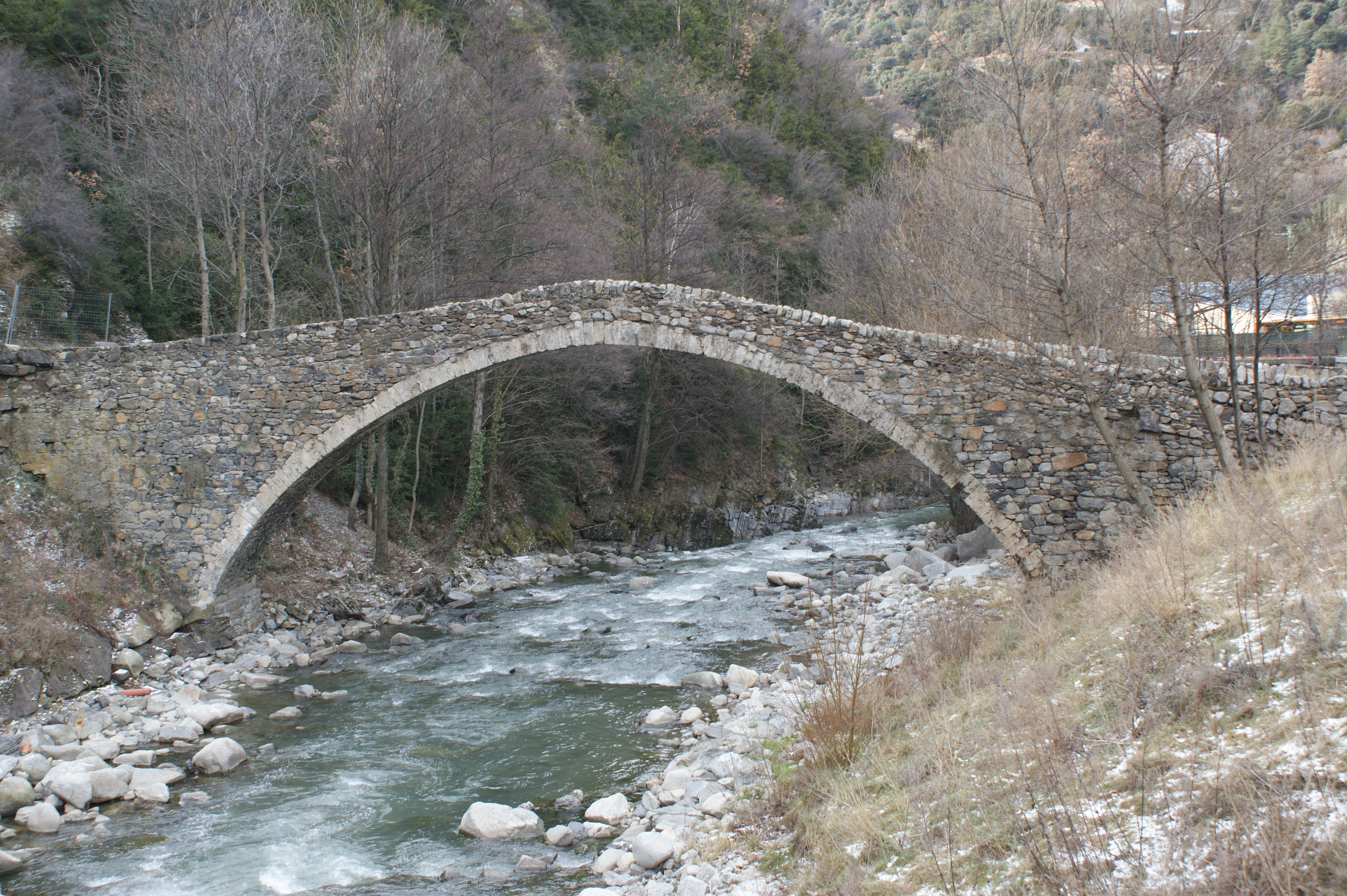 Pont de la Margineda (Santa Coloma)